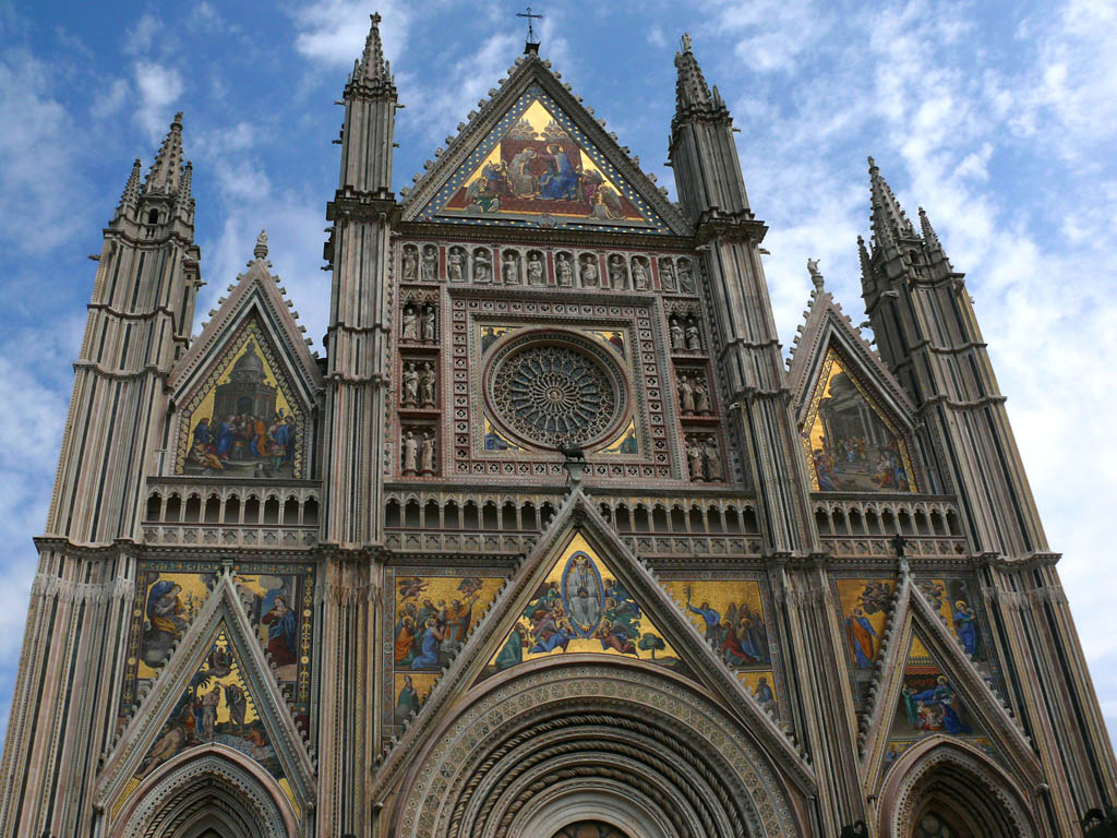 Orvieto: Duomo, front view